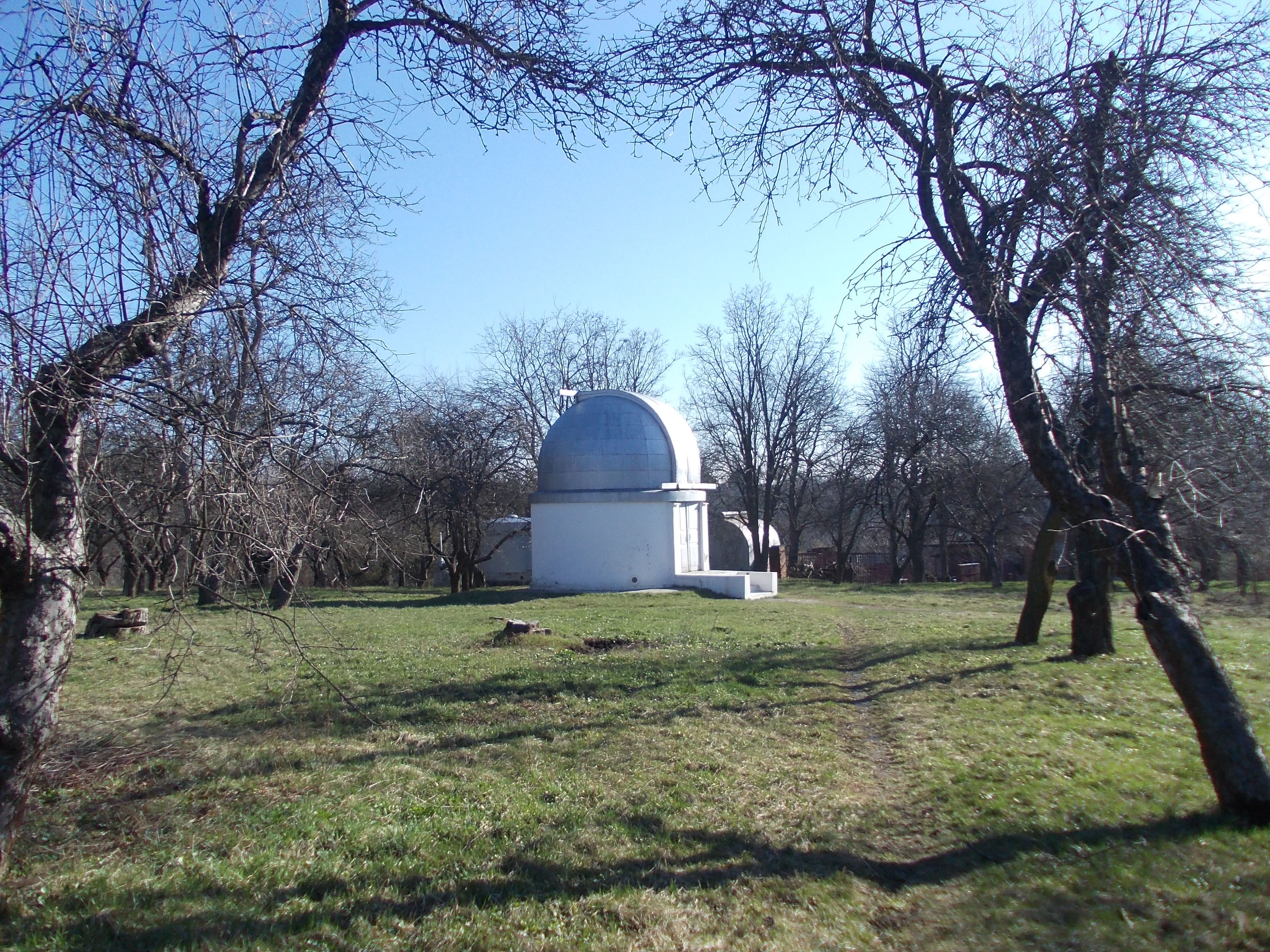 Місто Полтава. Територія Полтавської гравіметричної обсерваторії. Споруда з телескопом.